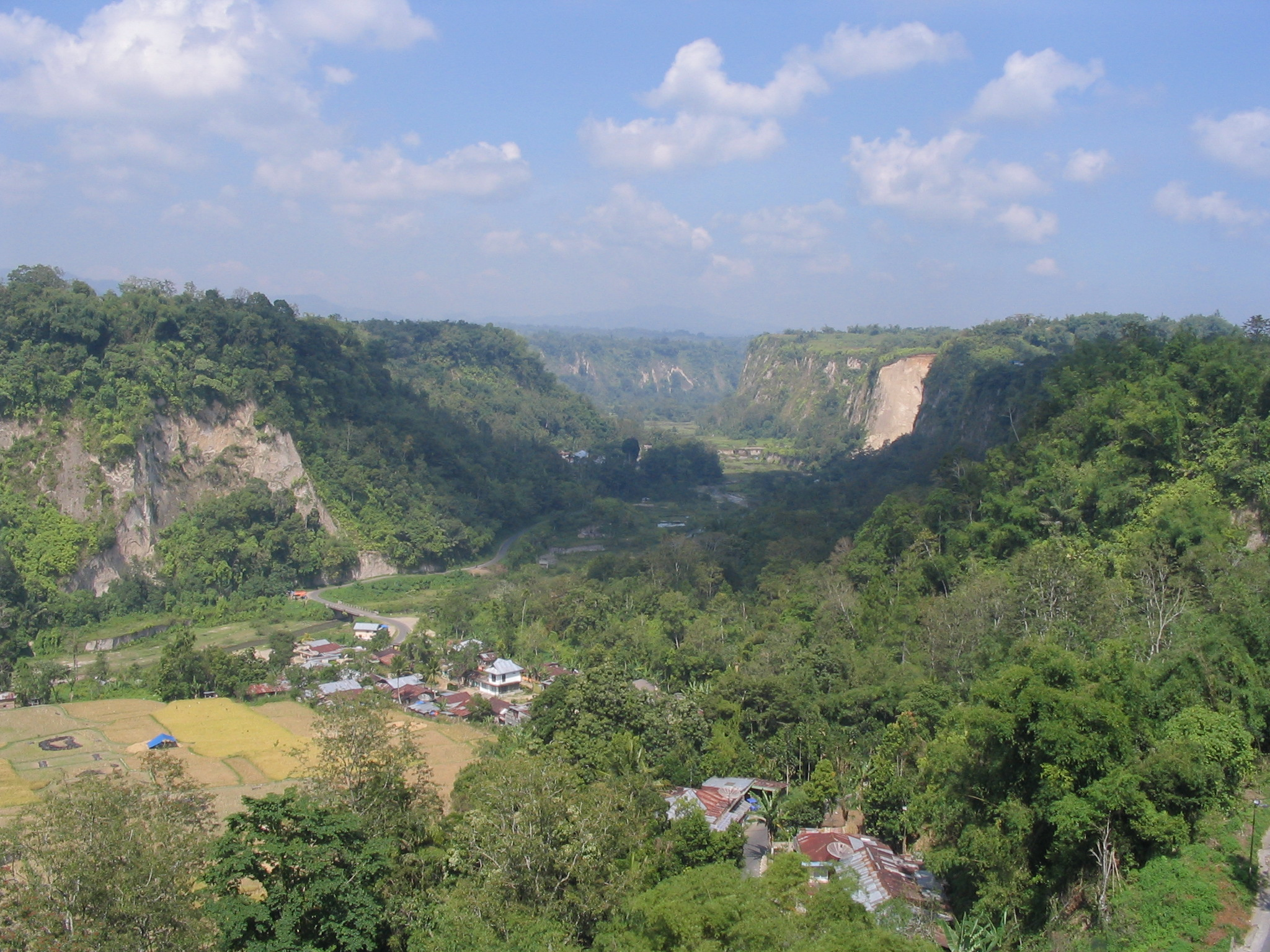 Cañón Sianok en Bukittingi, provincia de Sumatra Occidental, Indonesia.